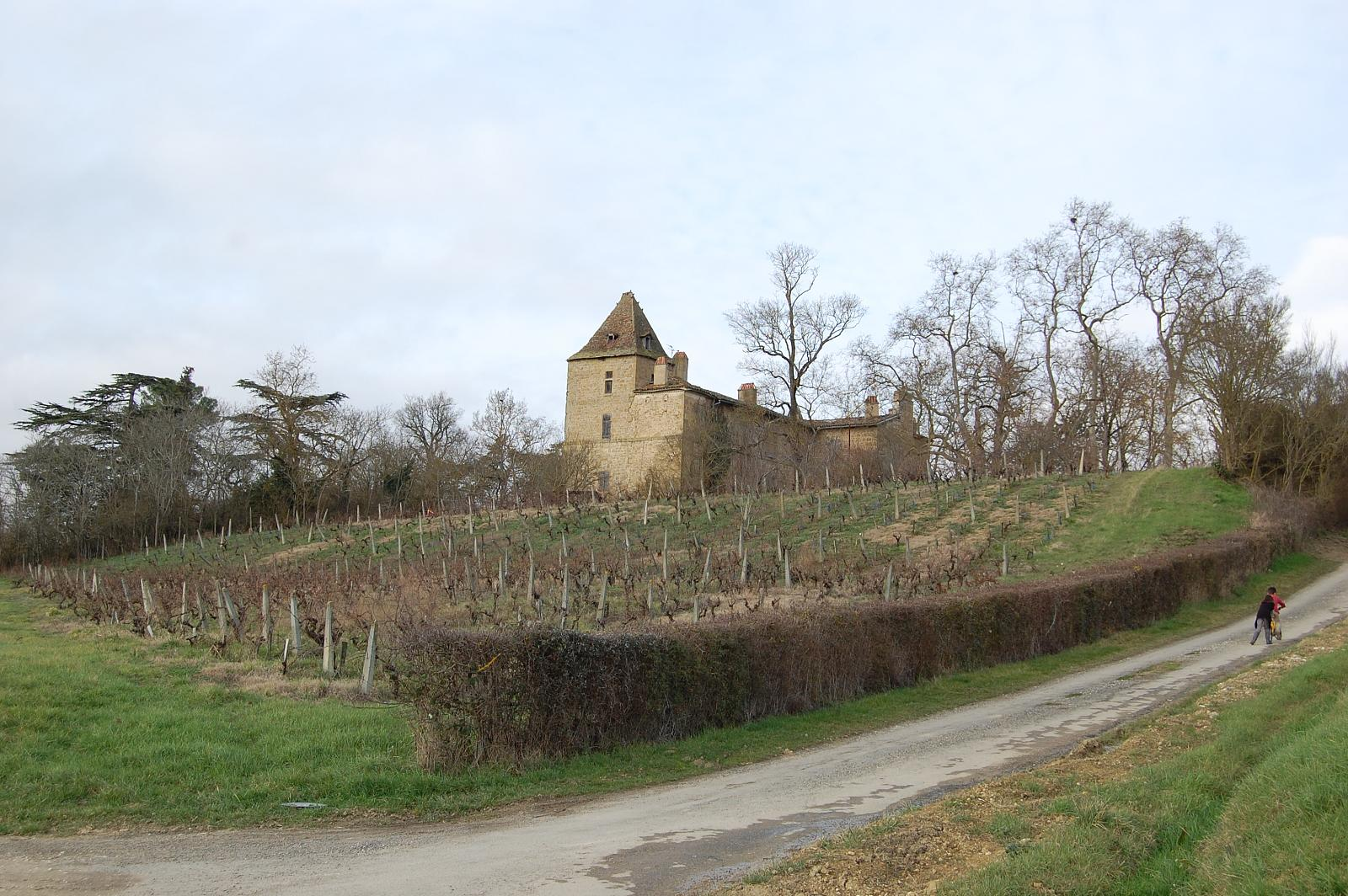 Château viticole de Reveillon, à Mirepoix dans le Gers